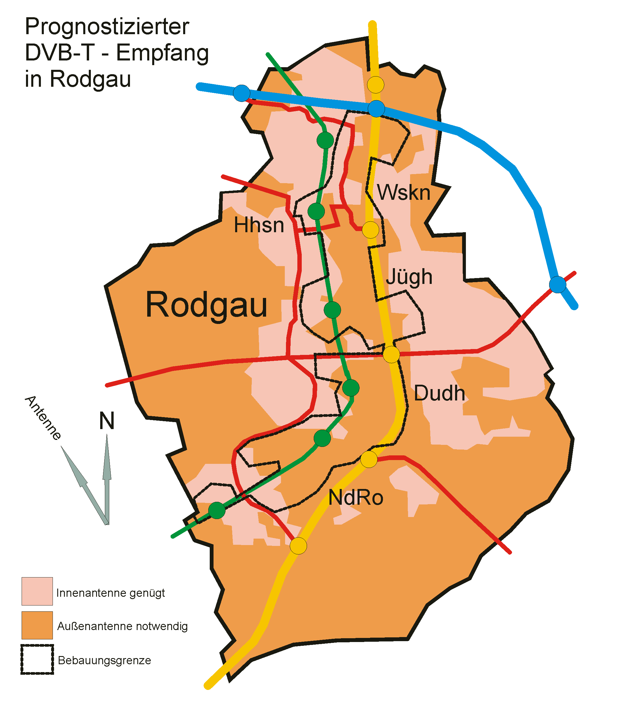 Prognostizierter DVB-T - Empfang in Rodgau Quelle: Bundesamt für Kartographie und Geodäsie Zeichner: presse03 Datum: 08.06.2006 Sonstiges: Ausschnitt nach Originalkarte neu erstellt